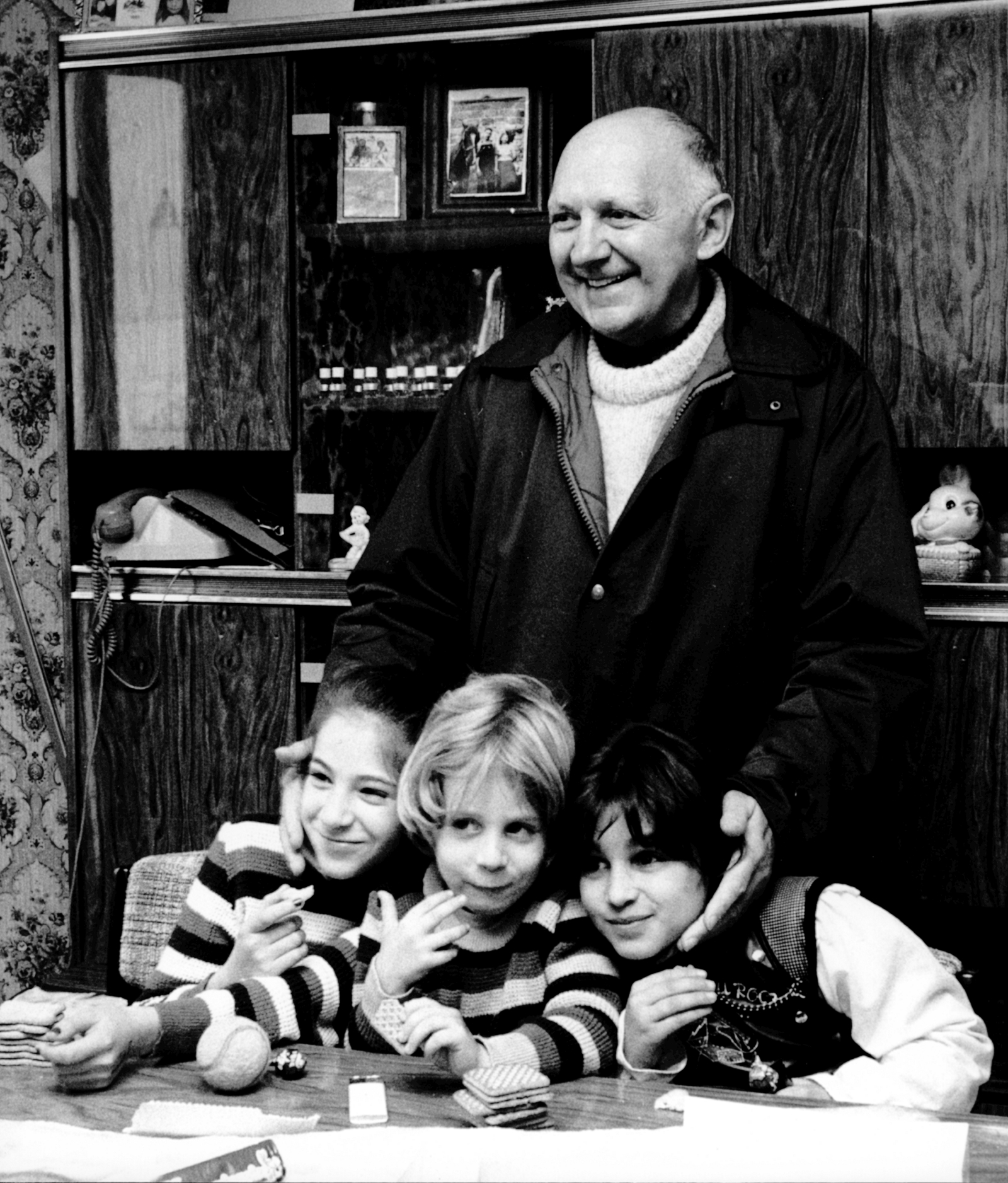 Joseph Wresinski en visite dans une famille du Val d'Oise